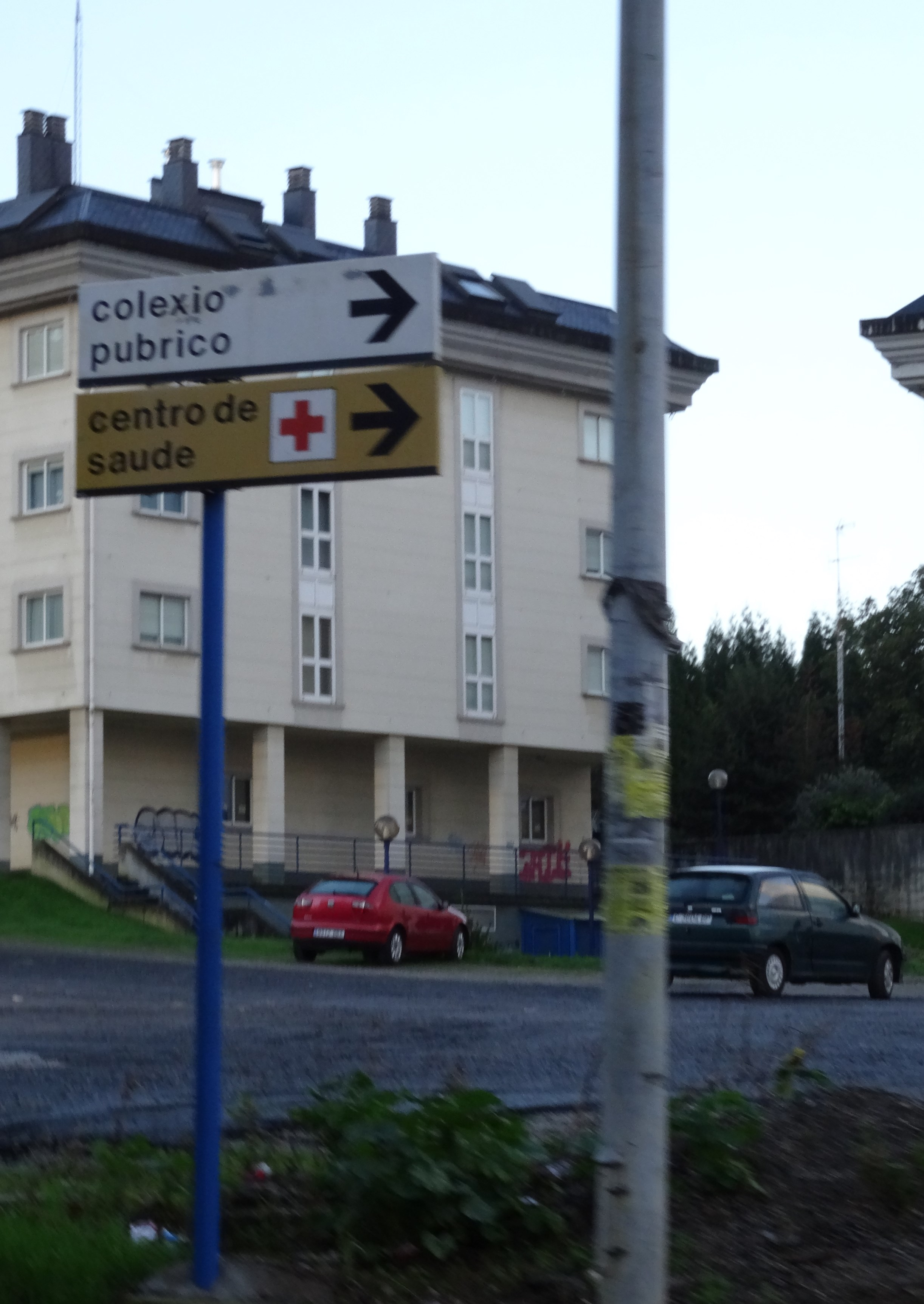 Cartel co hipergaleguismo *pubrico.